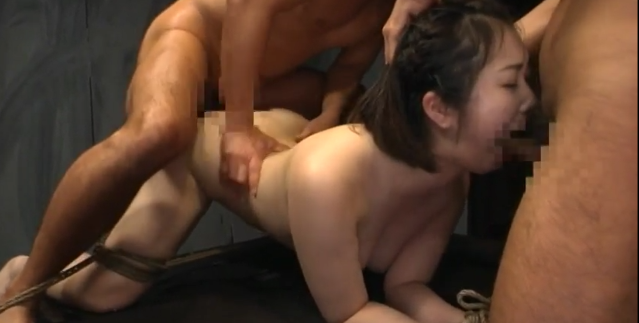 Nữ sẽ bị trói và các lỗ đểu được sử dụng. Thường là foursome